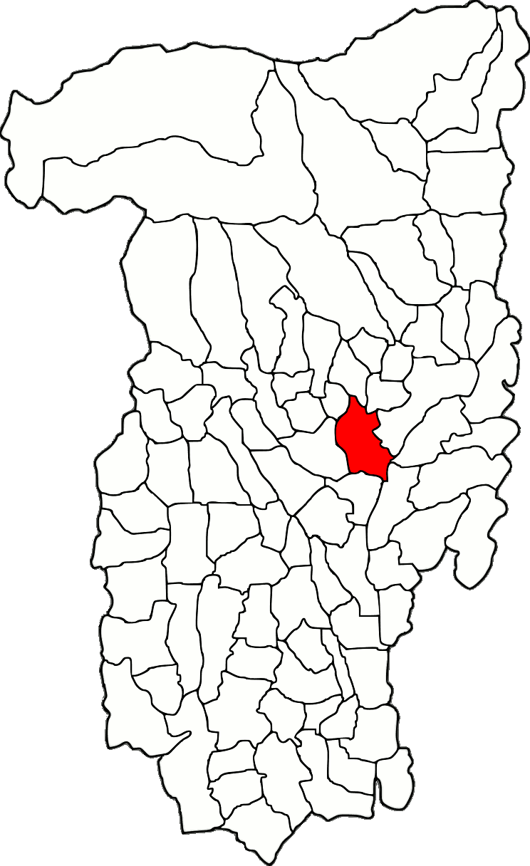 Lage der Gemeinde Mihăești im Kreis Vâlcea (RO).